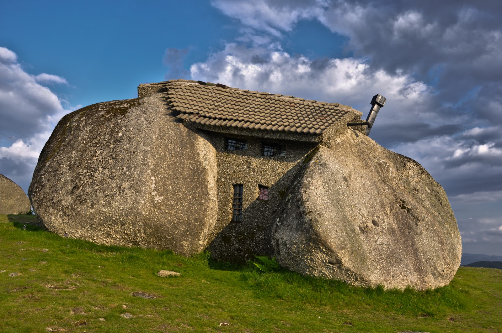 Parte posterior de la Casa do Penedo (Fafe, Portugal)